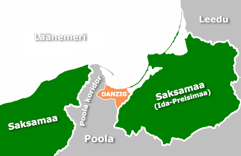 Poola koridor 1923–1939